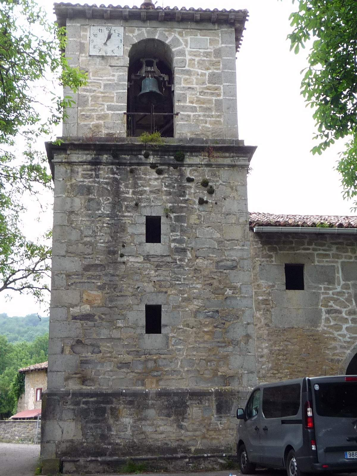 Abezia (Urkabustaiz, Álava) - Iglesia de San Martín